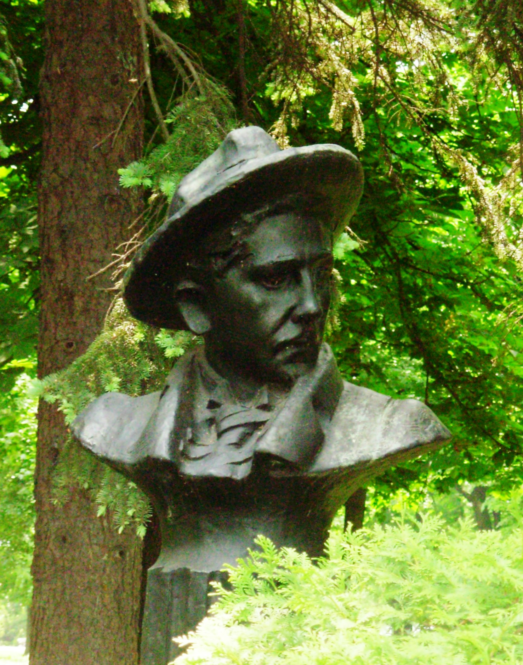 Bista Radoja Domanovića na Kalimegdanu, Beograd. Slikao Goldfinger